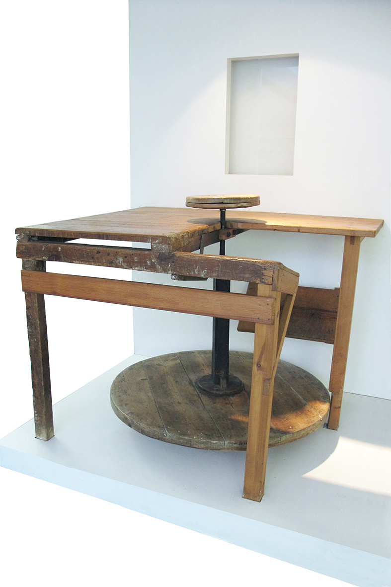 Torno, Manises, 1930 (para tornear peizas)